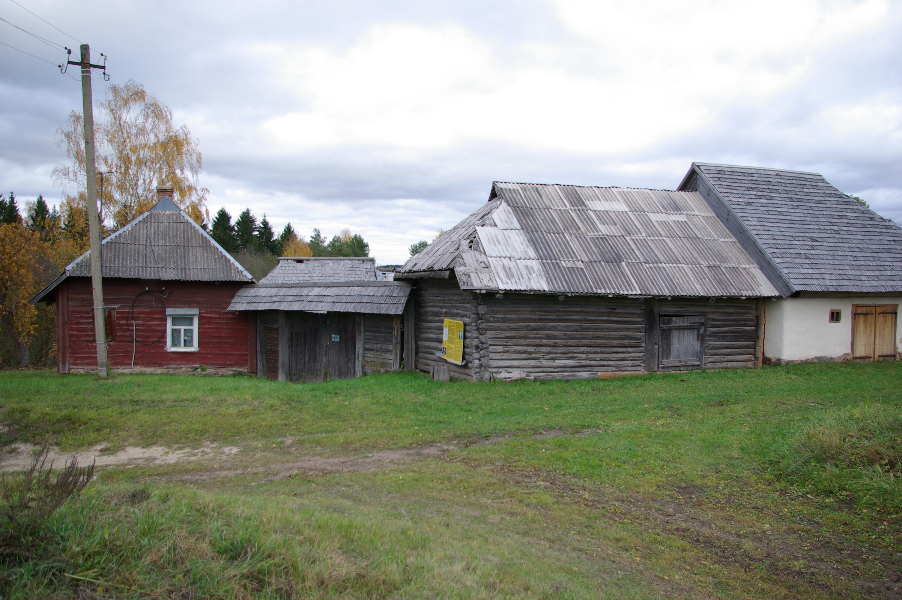 Luikjärve talu